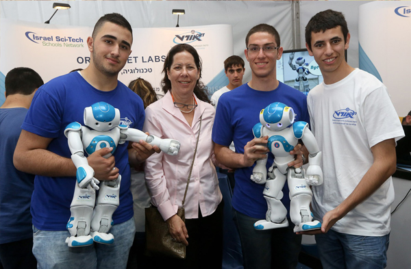 תלמידי אורט מציגים רובוטים בתכנות עצמי, במסגרת שבוע המדע